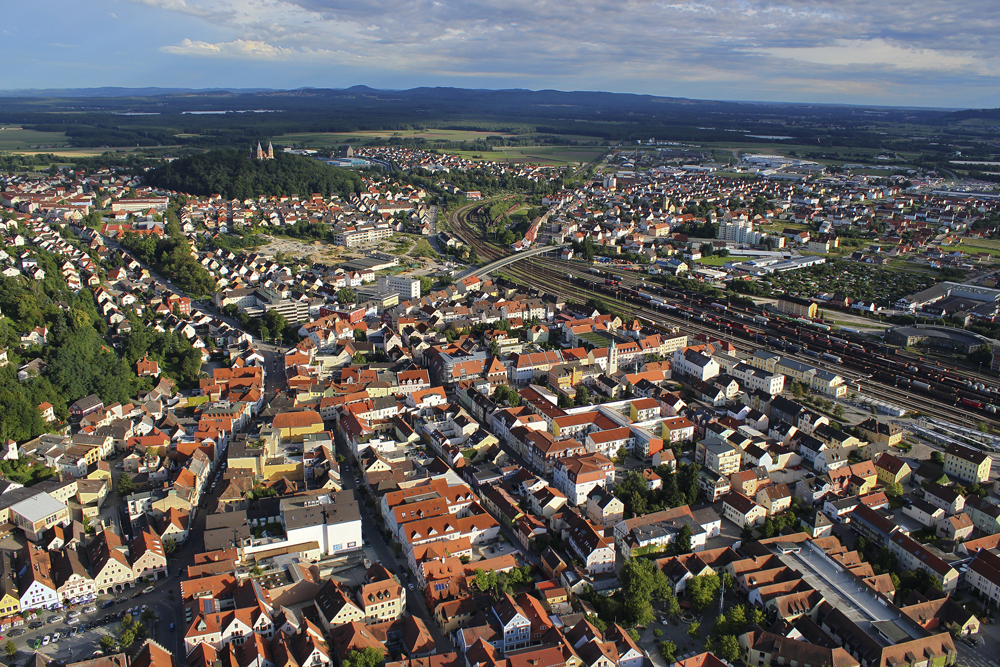 Schwandorf aus der Luft fotografiert